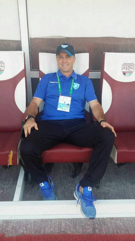 avramovski